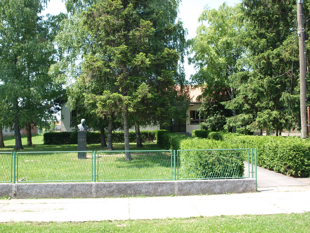 Osnovna škola Stjepana Radića u selu Stari Perkovci, Brodsko-posavska županija.